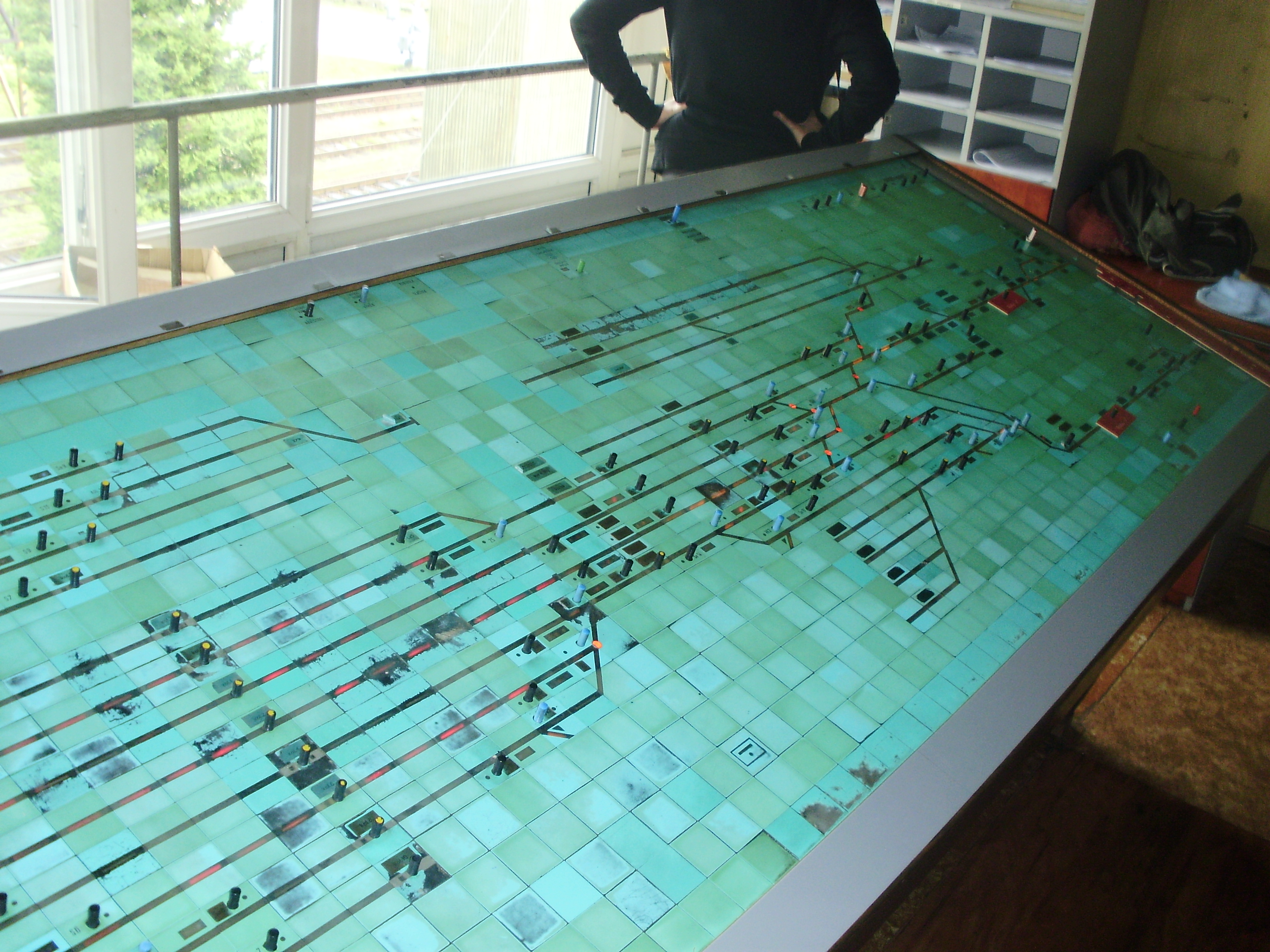 část pultu RZZ O.-Zárubek, zhlaví směr Doubrava a AMO VH, v traťové koleji směr Doubrava vidíme reliéf dopravních kolejí stanice Josefova Jáma, která je ze Zárubku dálkově řízena.